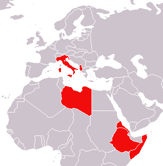 Karta över Italien med kolonier och andra områden vid andra världskrigets utbrott i september 1939.